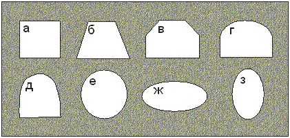 Форми поперечного перетину підземних гірничих виробок